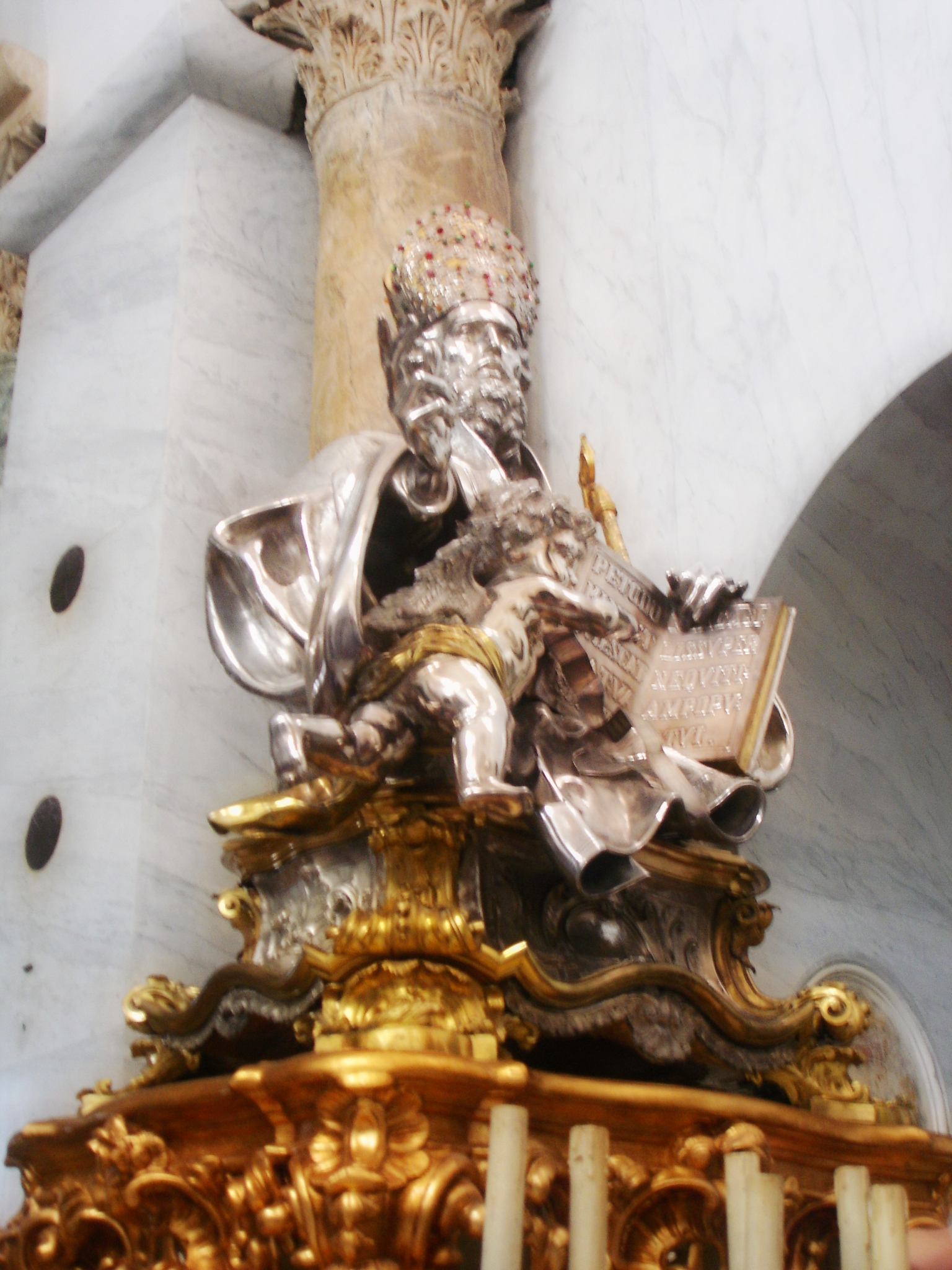 Statua di San Sabino a Canosa di Puglia.